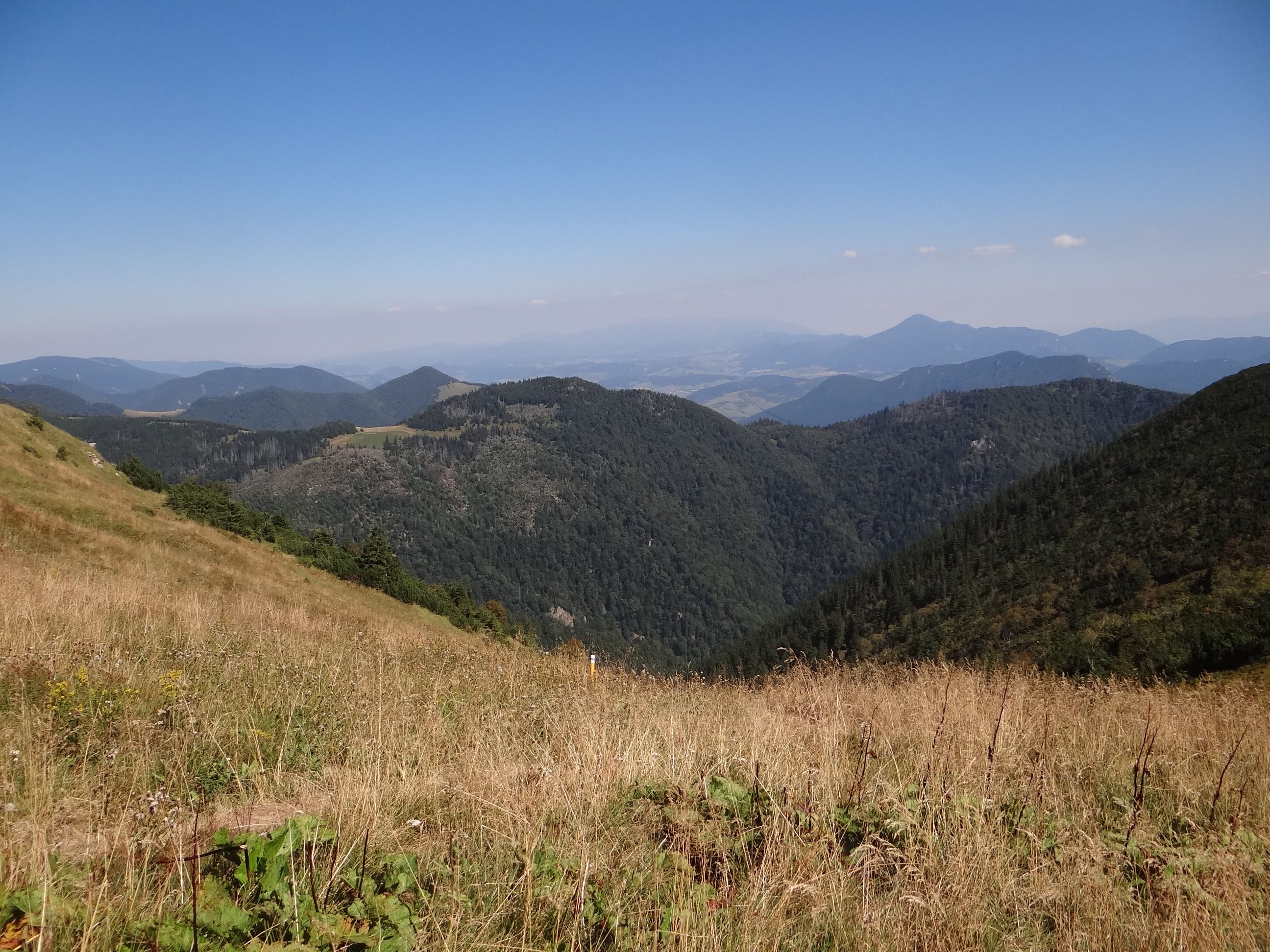 Šútovská dolina